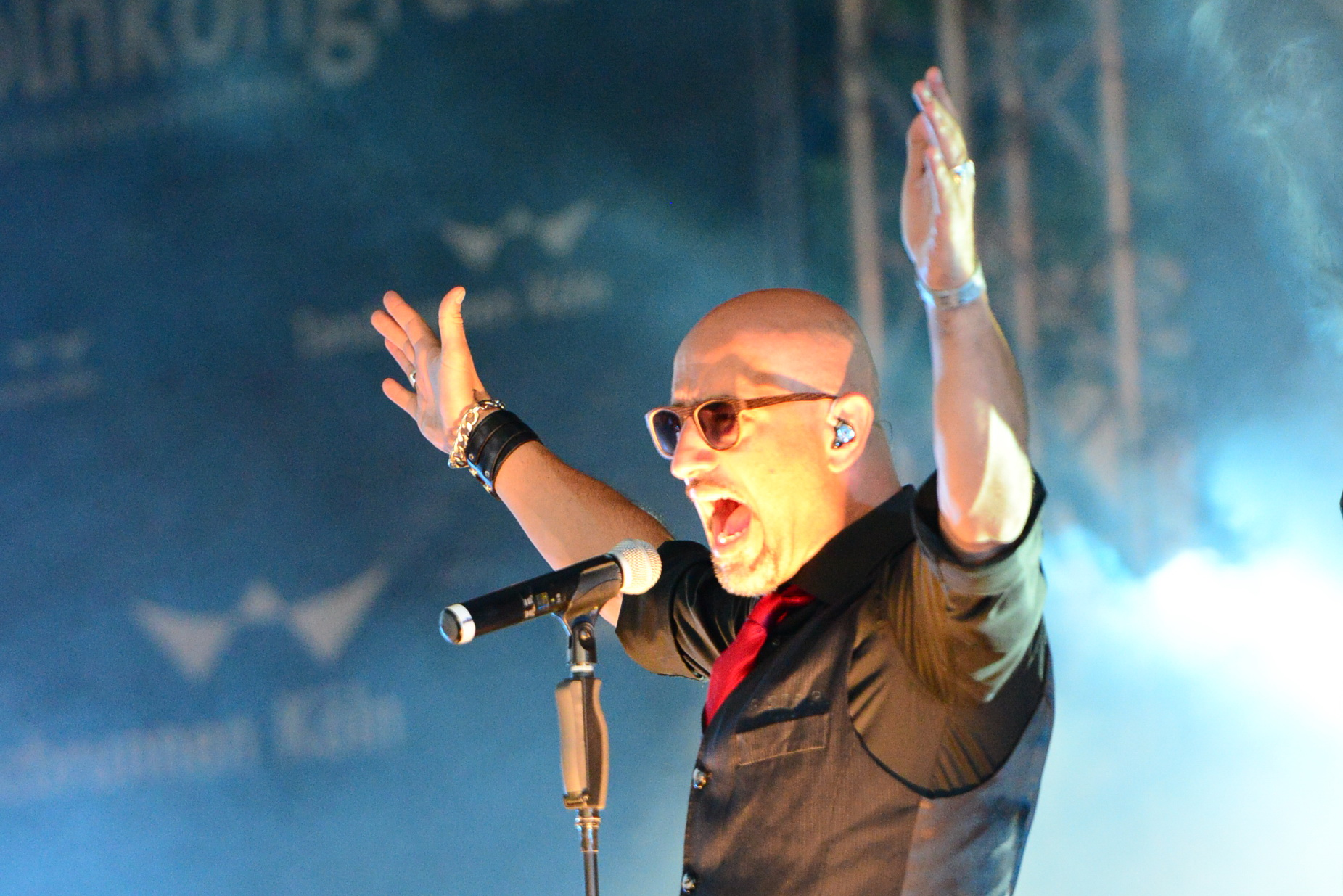 Eisbrecher, Amphi festival 2014